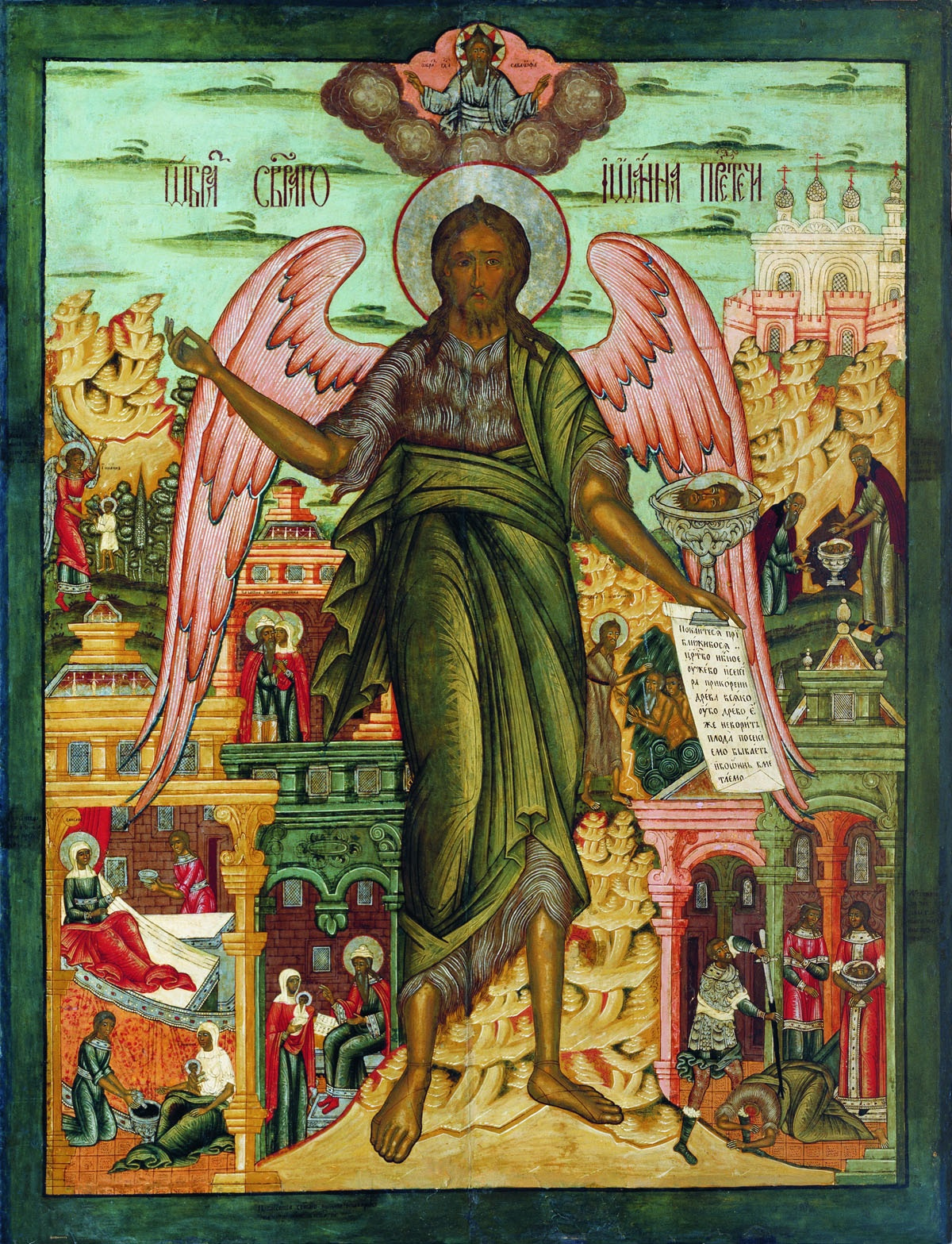 Икона "Иоанн Предтеча — Ангел пустыни в житии". Местонахождение: Государственный музей истории религии, Санкт-Петербург